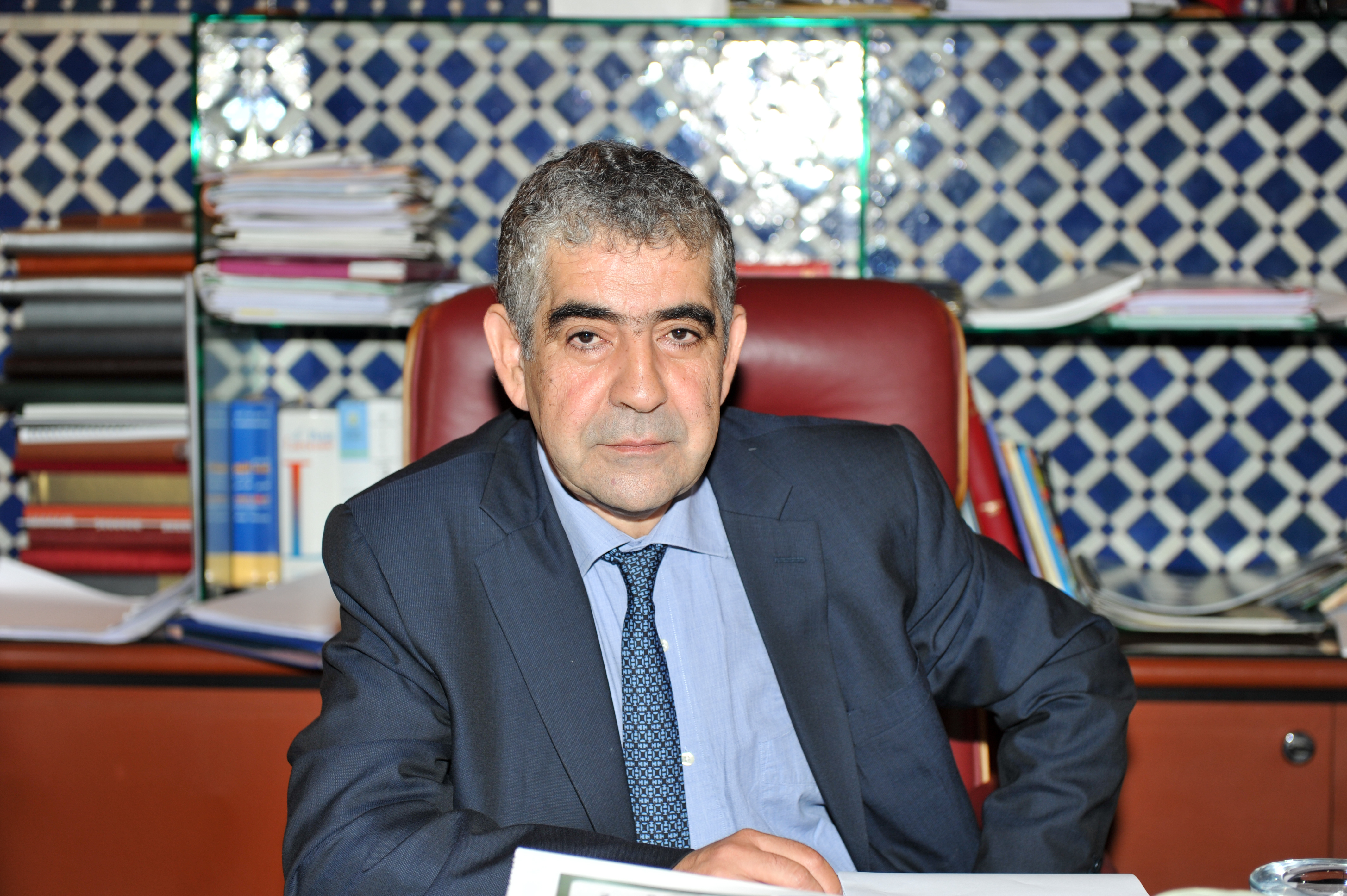 Président du Conseil national des droits de l'Homme (CNDH)